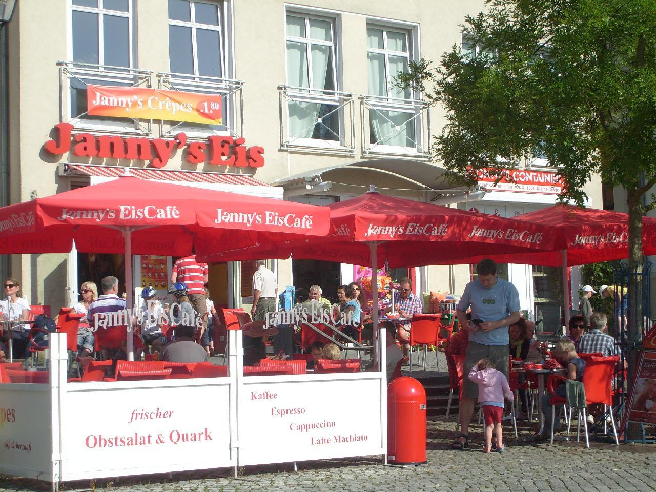 Filiale der Franchise-Kette Janny's Eis in Waren (Müritz).